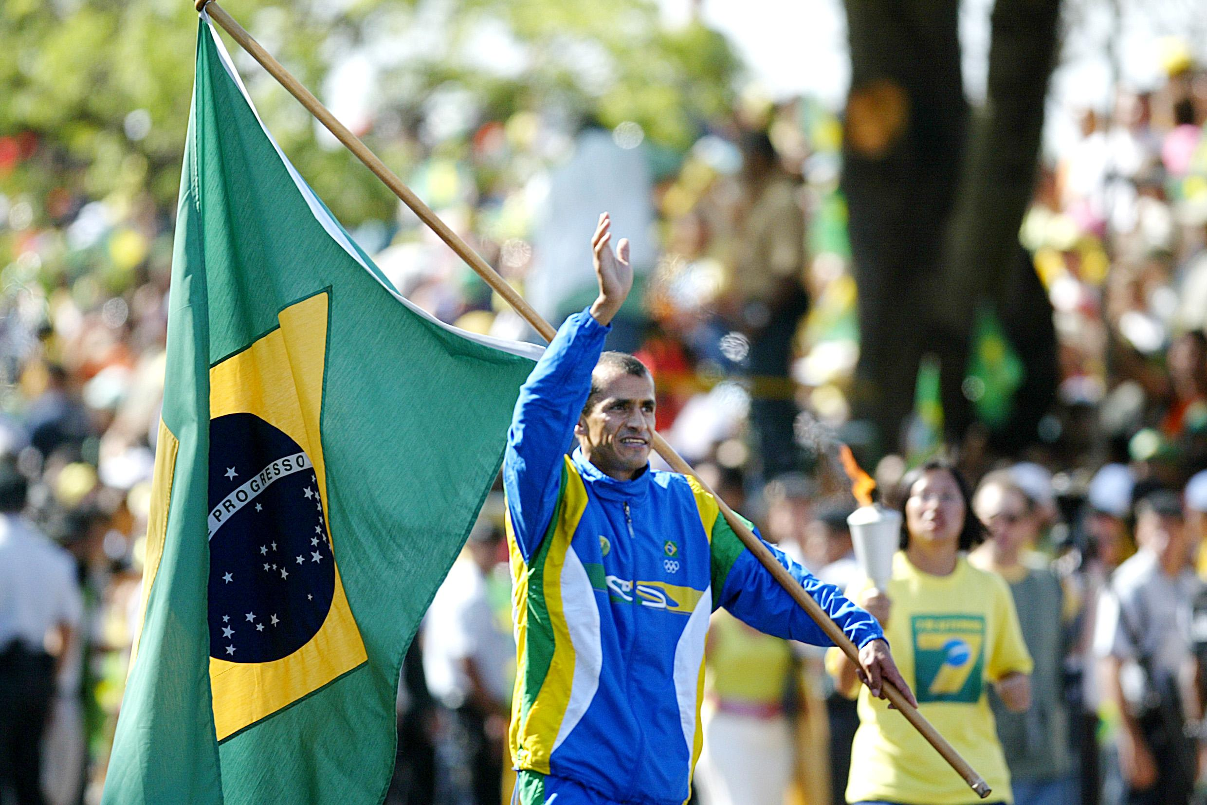 Brasília - O maratonista Vanderlei Cordeiro de Lima desfila com a bandeira do Brasil,durante comemoração do Dia da Independência, na Esplanada dos Ministérios.